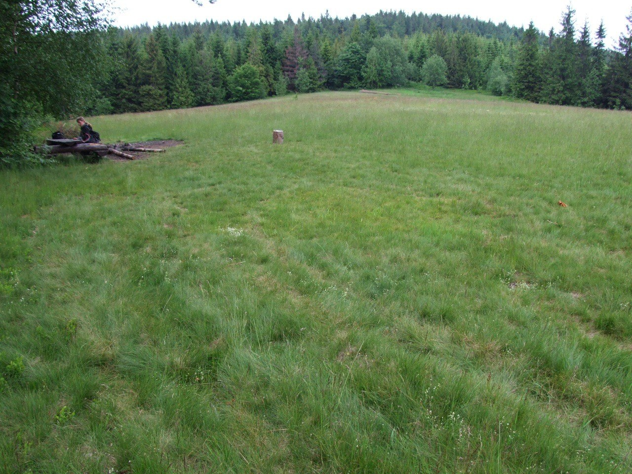 Polana Myconiówka na Łopieniu (Beskid Wyspowy)